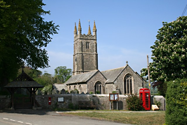 Lezant Church